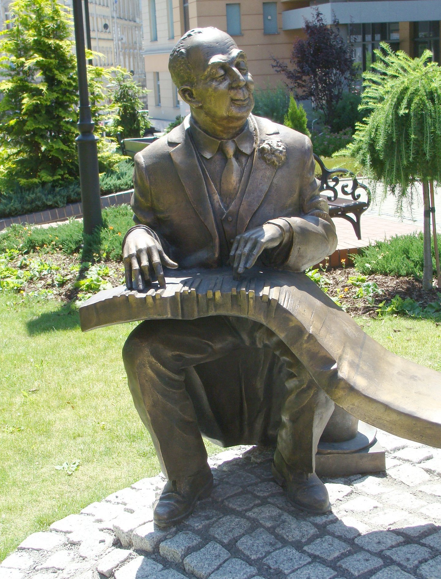 Jerzy Wasowski, część pomnika Starszych Panów - dzieło Mariana Molendy na wzgórzu uniwersyteckim w Opolu